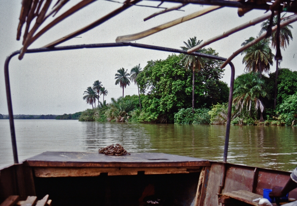 Bootstour auf dem Gambia River bei Janjanbureh Island (McCarty Island) hier wird der Fluß von Galeriewald gesäumt